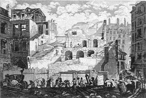 Démolition du Grand Chatelet de Paris France